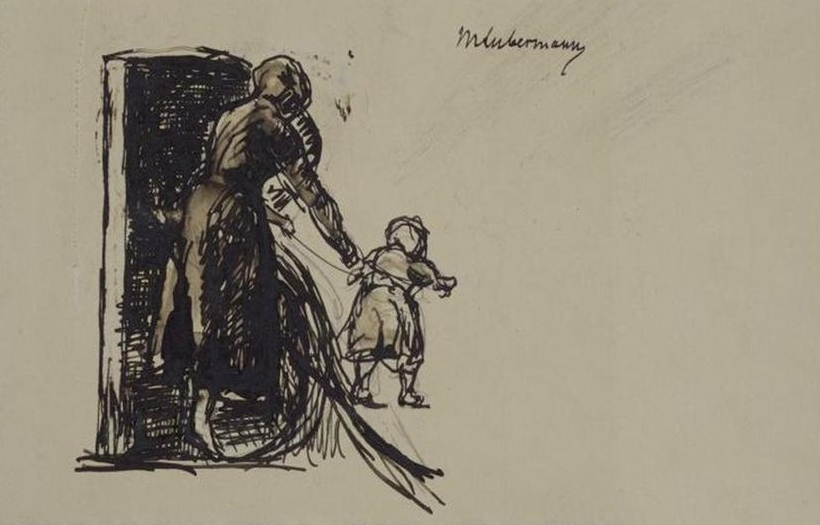 Max Liebermann: Frau mit Kind von hinten, work published by Staatsanwaltschaft Augsburg.